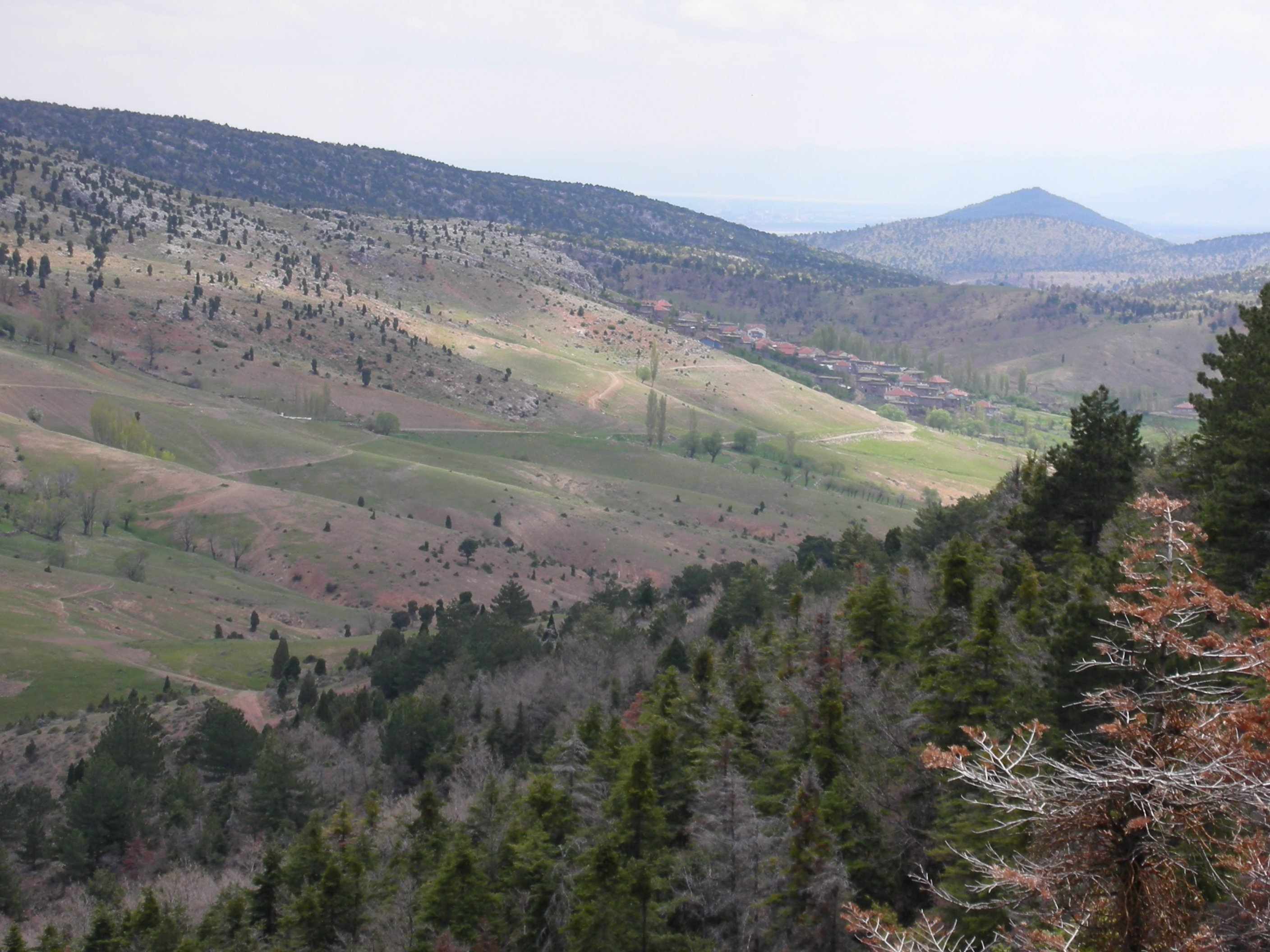 Şamlar landsbyen sett fra vest.